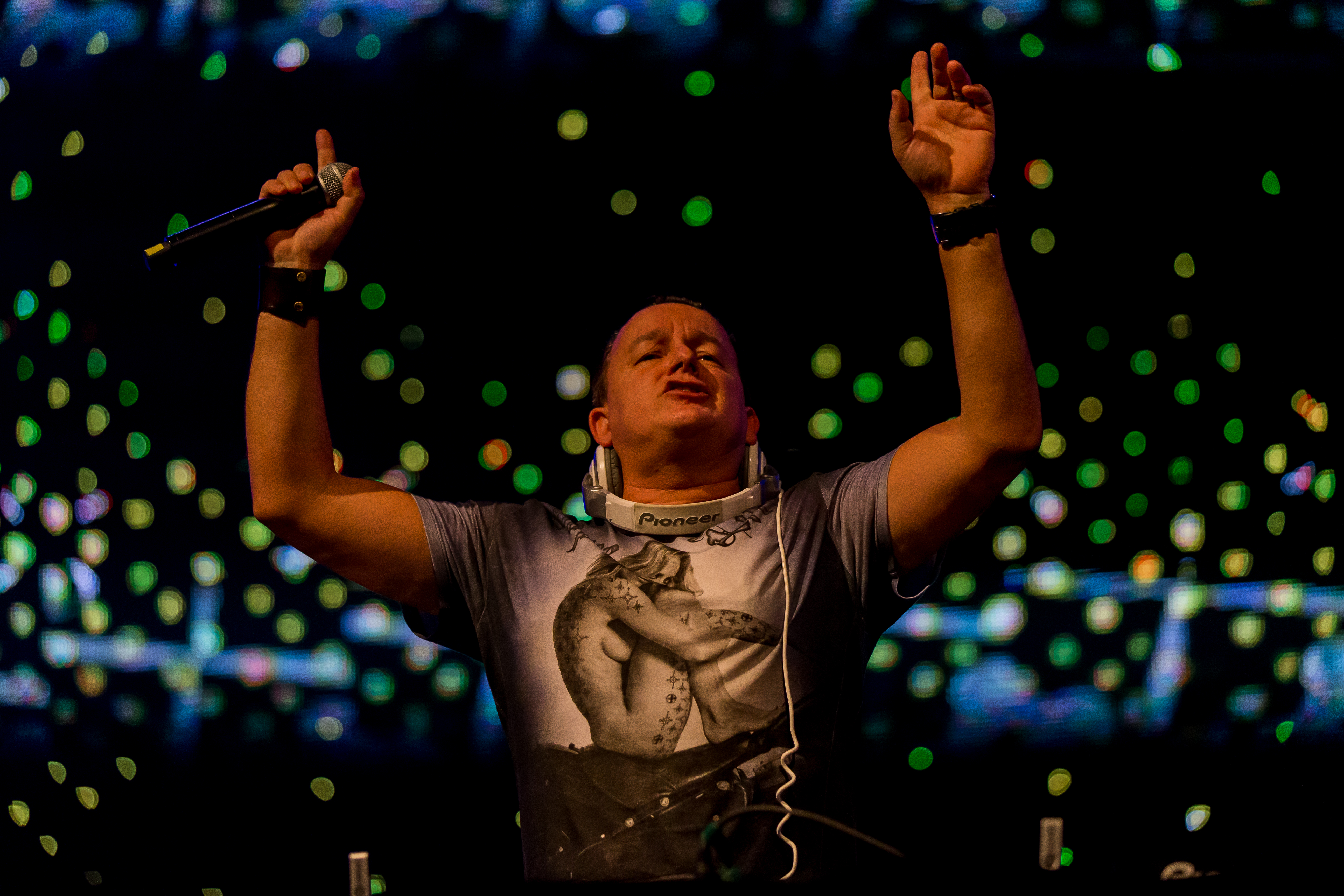 Sash! during sunshine live "Die 90er - Live on Stage" at Maimarkt Halle, Mannheim, Baden-Württemberg, Germany on 2015-11-29, Photo: Sven Mandel